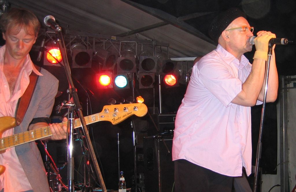 Gerd Knebel (re.) mit seiner ehemaligen Band "Die groben Junggesellen" auf dem Hammer Open Air